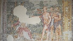 San Pietro di Morubio: Villa Verità, affresco loggia.